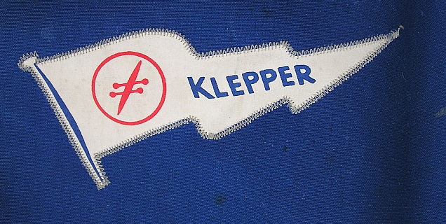 Flagge von Klepper Faltboot